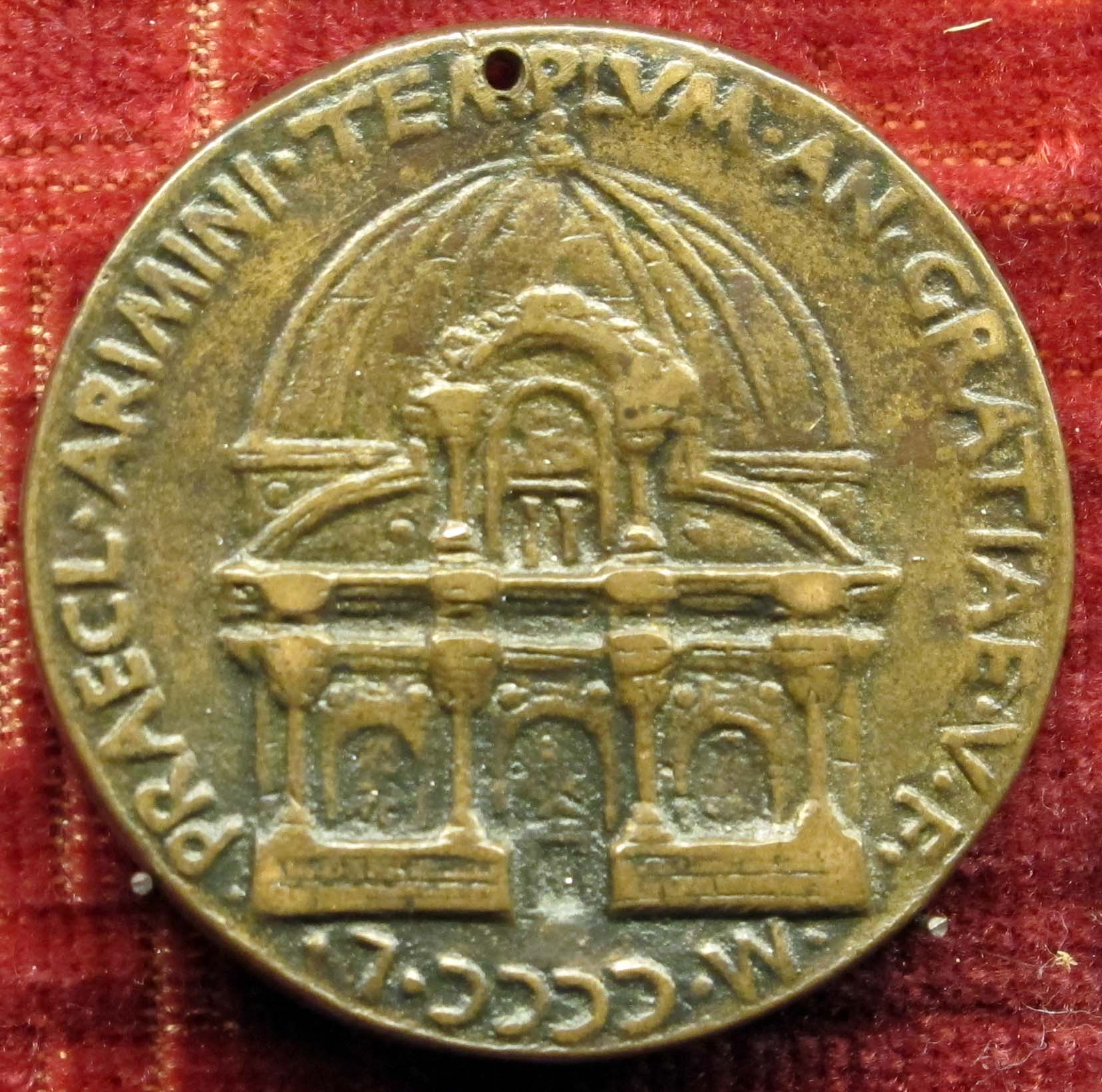 Matteo de' pasti, medaglia di sigismondo pandolfo malatesta col tempio malatestiano, verso 1450